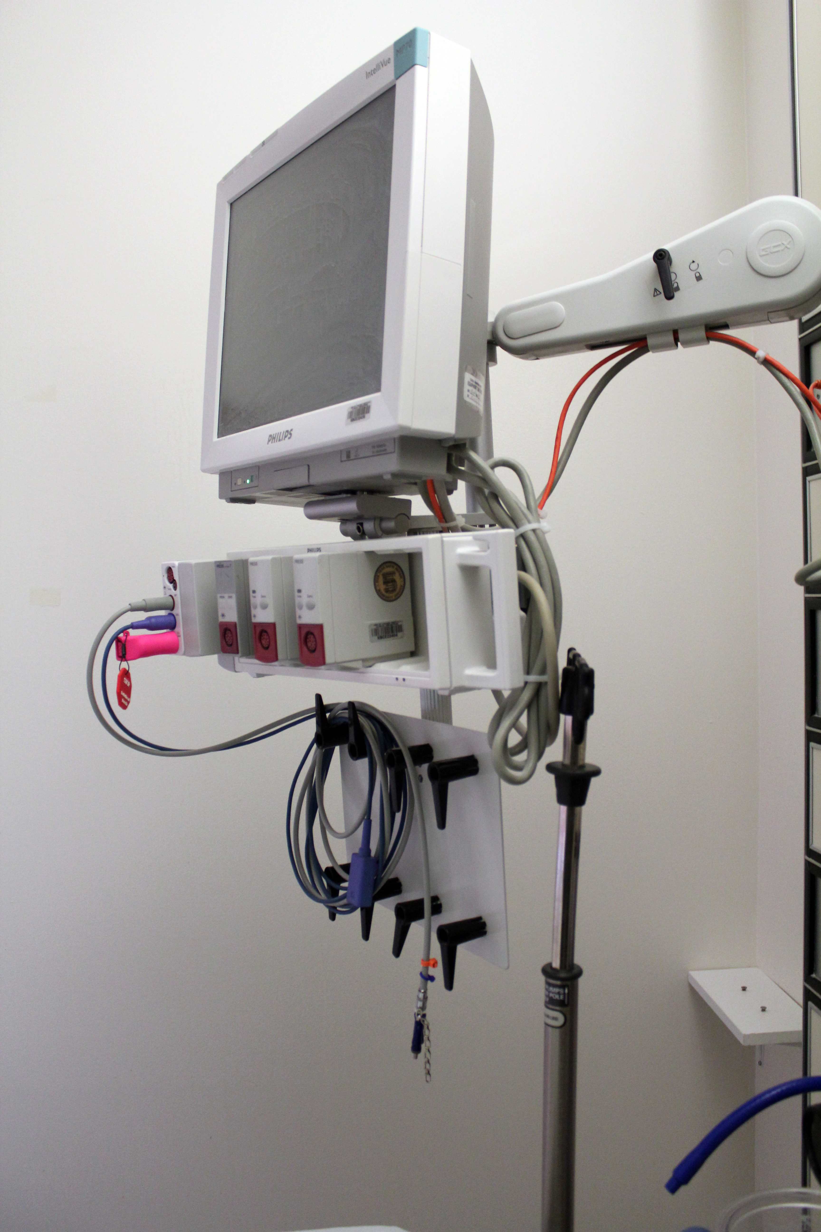 ICU monitor (side)